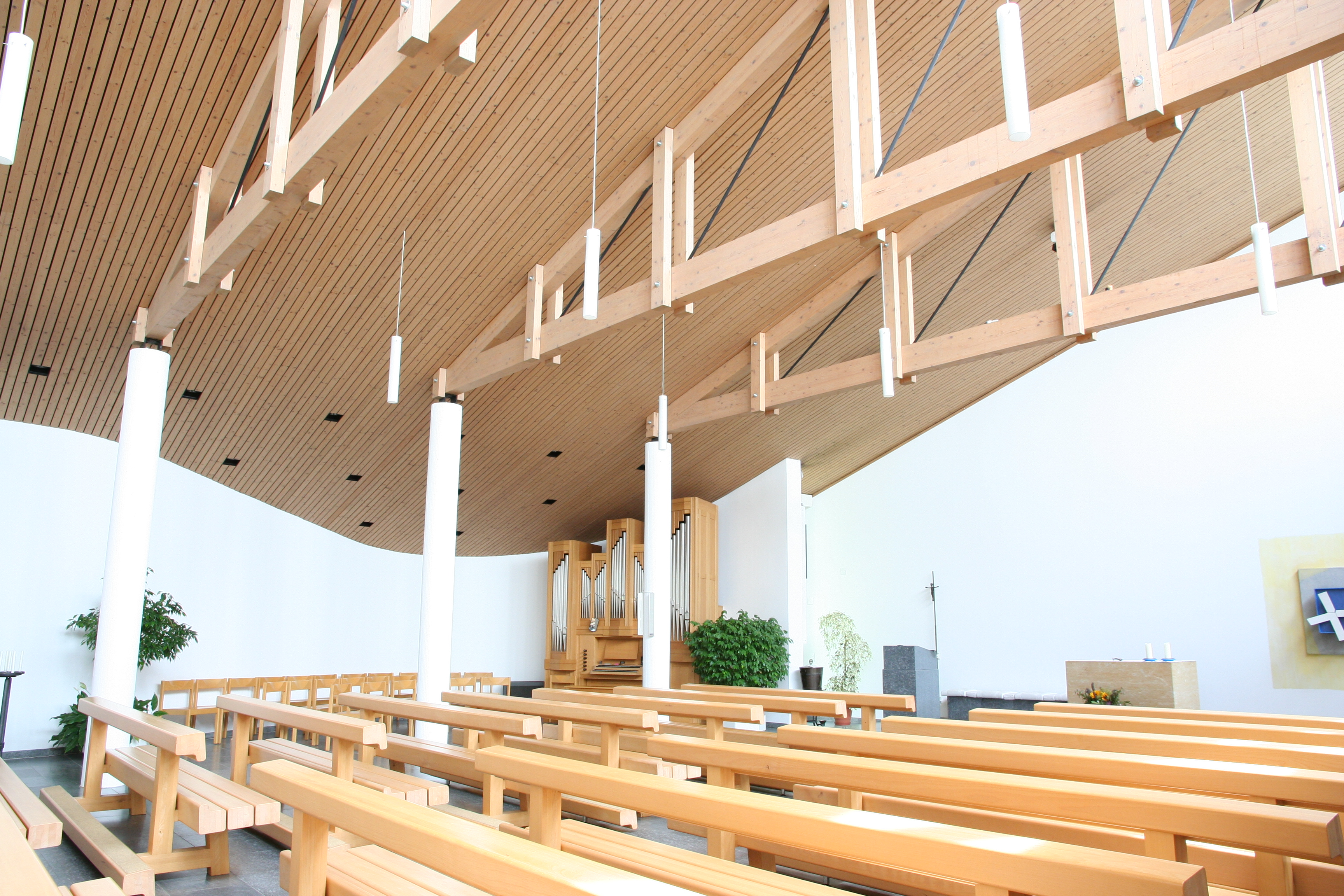 Römisch-katholische Kirche St. Antonius in Hirzel ZH, Innenansicht